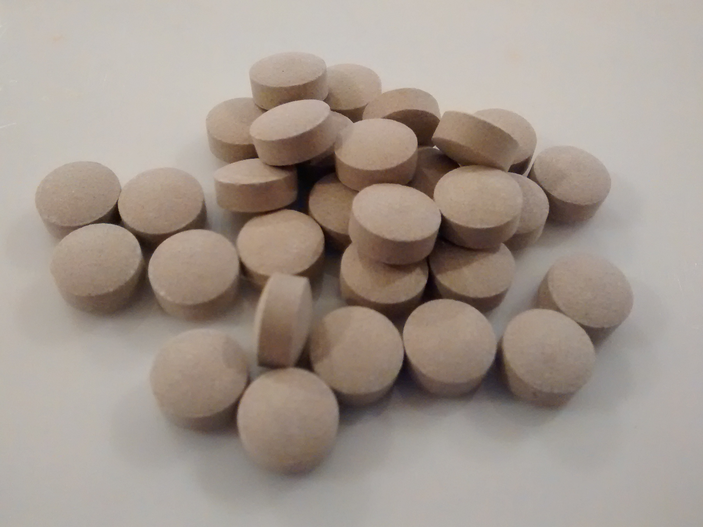 Iodine supplements.